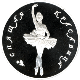 Монета Банка России — Серия: «Русский балет», Выпуск 1995 года — «Спящая красавица», 25 рублей — Pd, реверс.